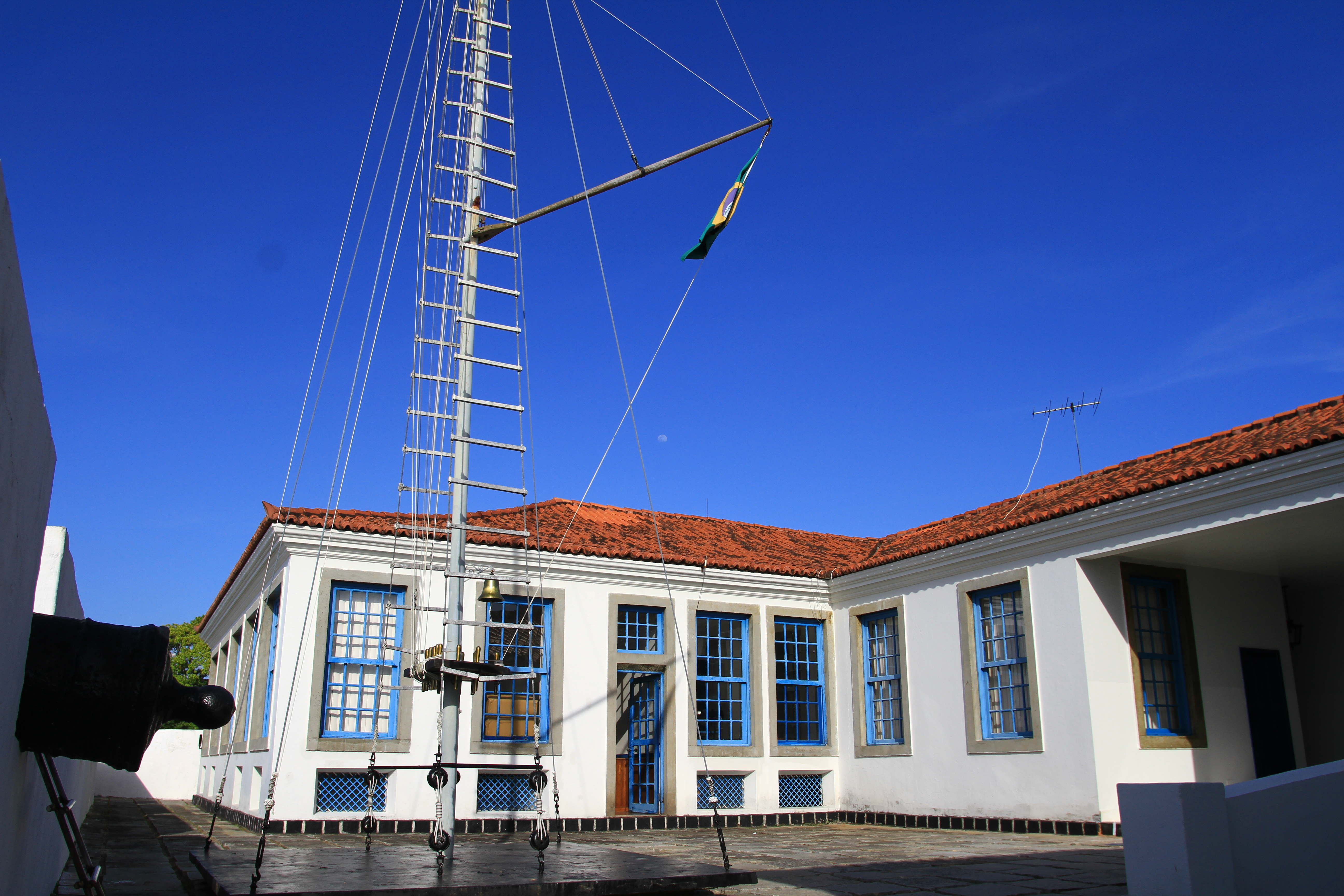 Forte de São Lourenço